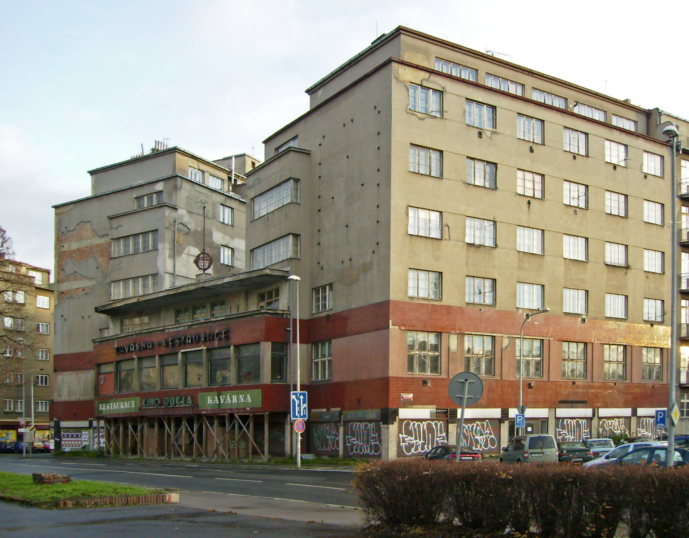 Palác Svět v Praze8-Libni